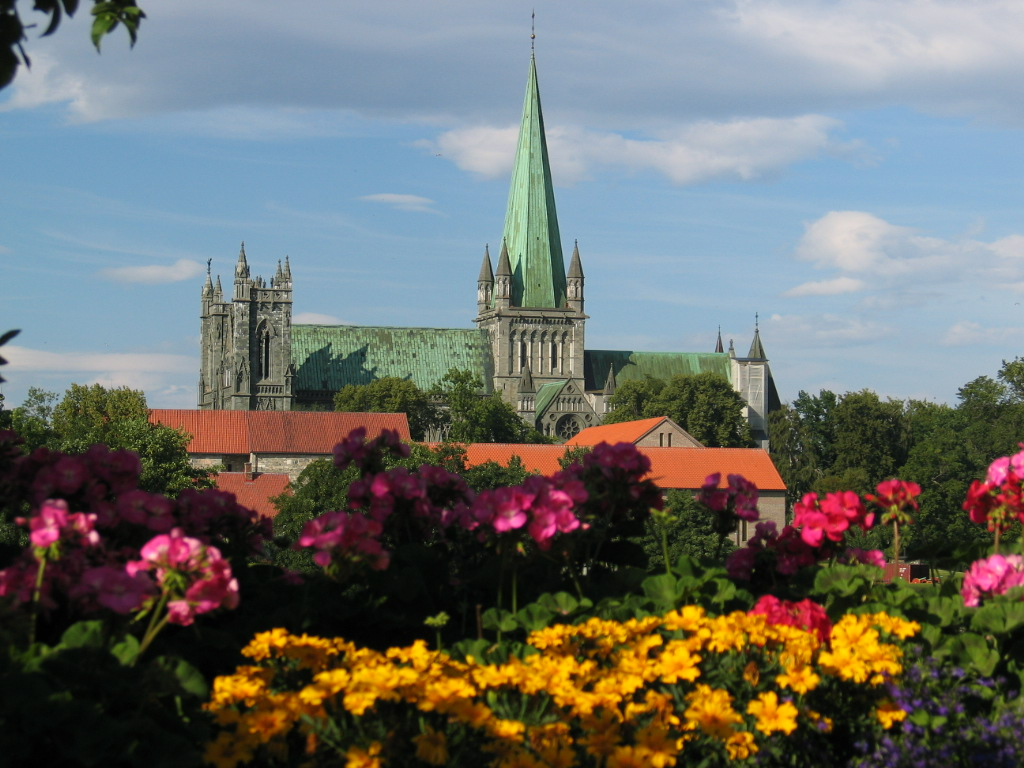 Nidarosdomen in Trondheim